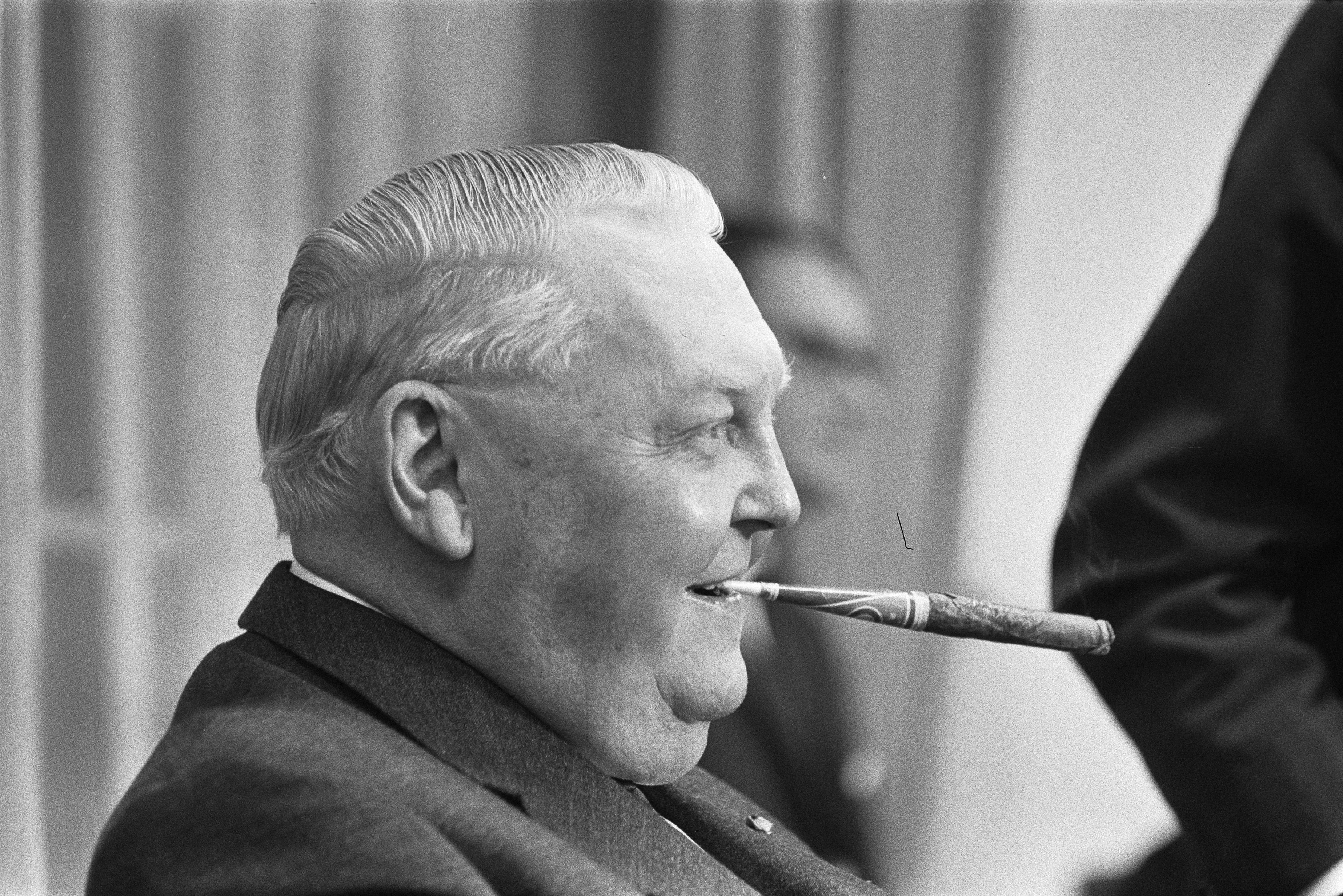 Ende des Besuchs von Bundeskanzler Ludwig Erhard, Pressekonferenz im Nieuwspoort in Den Haag.